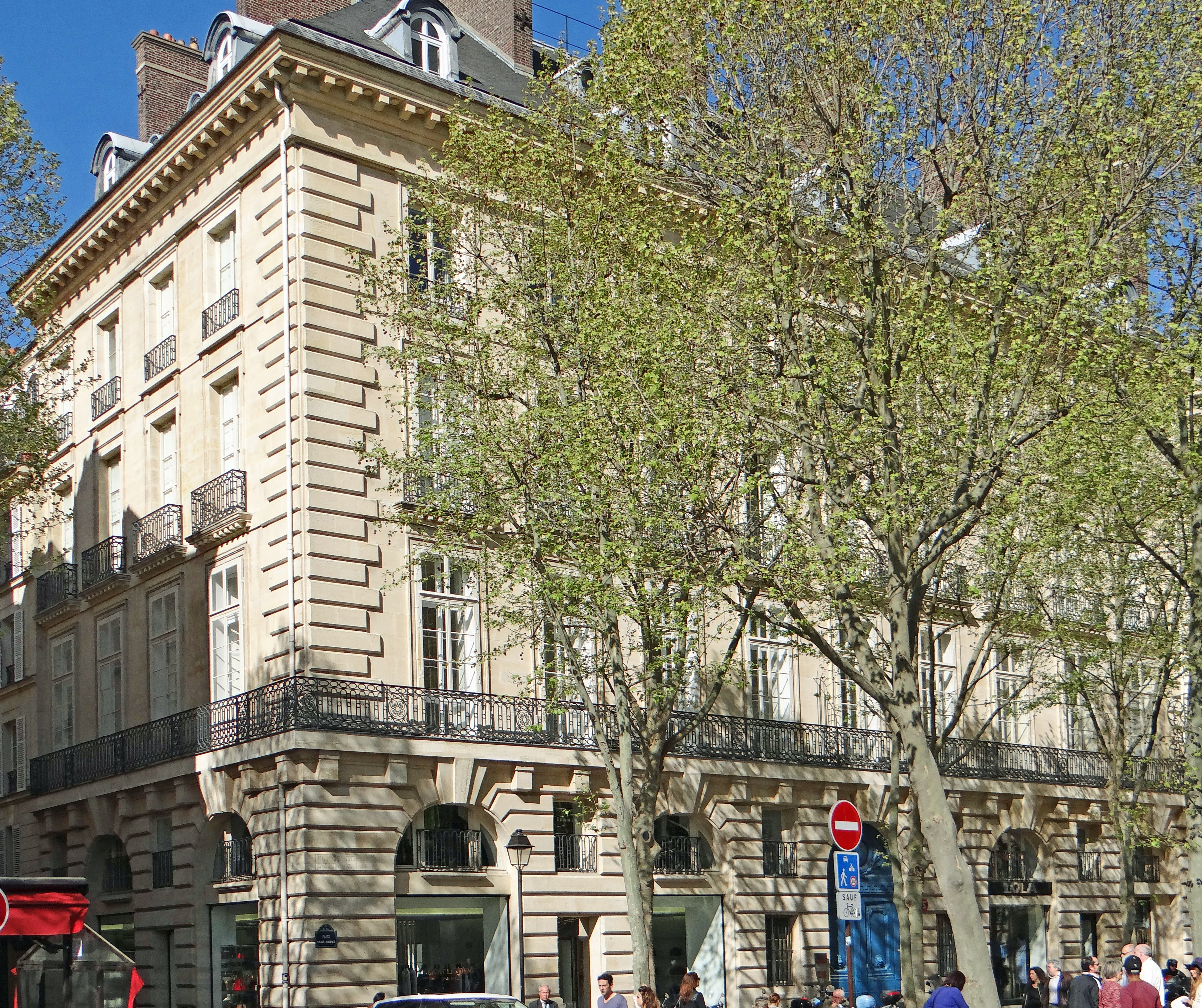 Paris - Place Saint-Sulpice à l'angle de la rue des Canettes - Maison de Servandoni